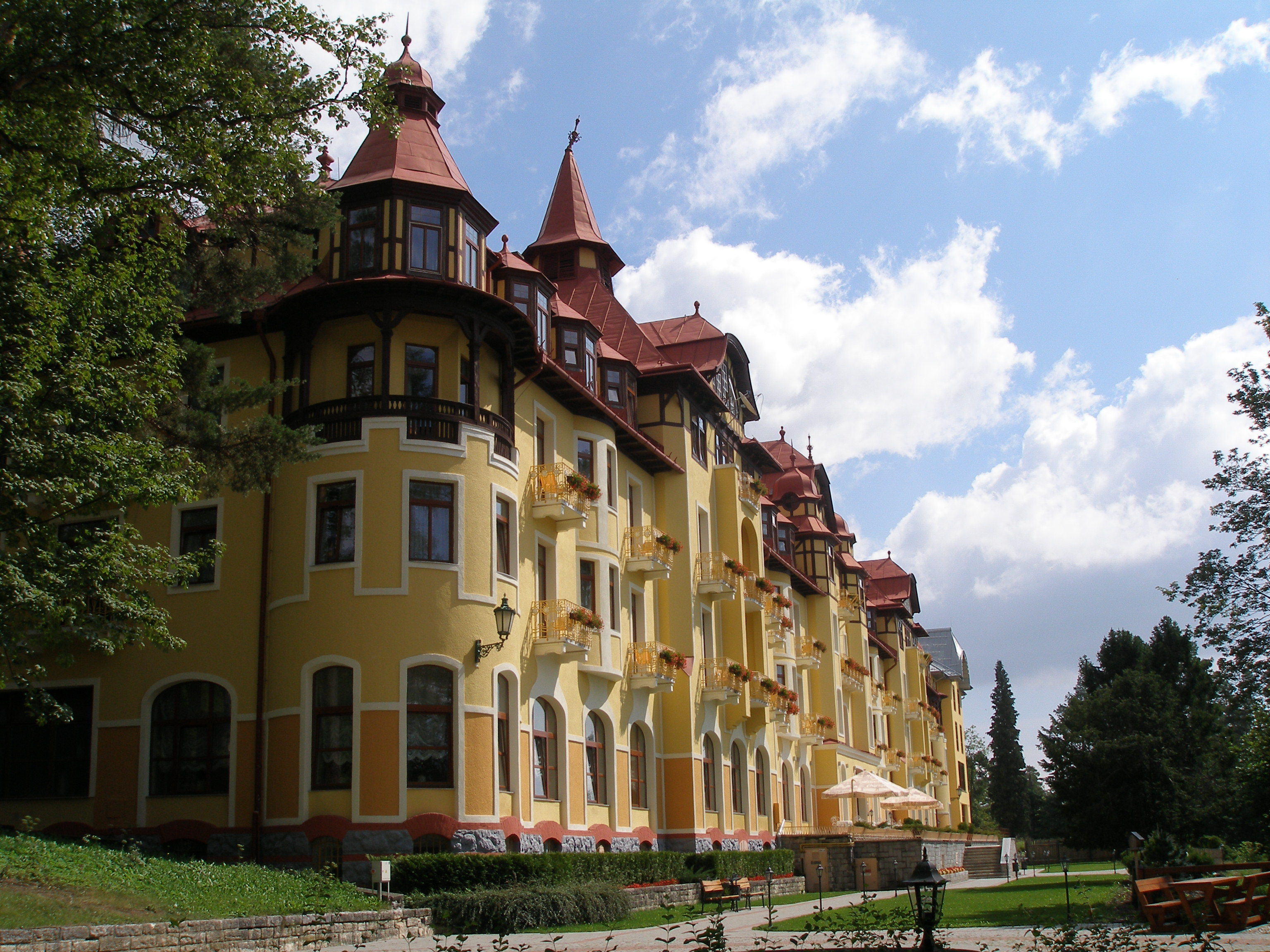 Okolie osady Tatranská Lomnica. Grandhotel Praha